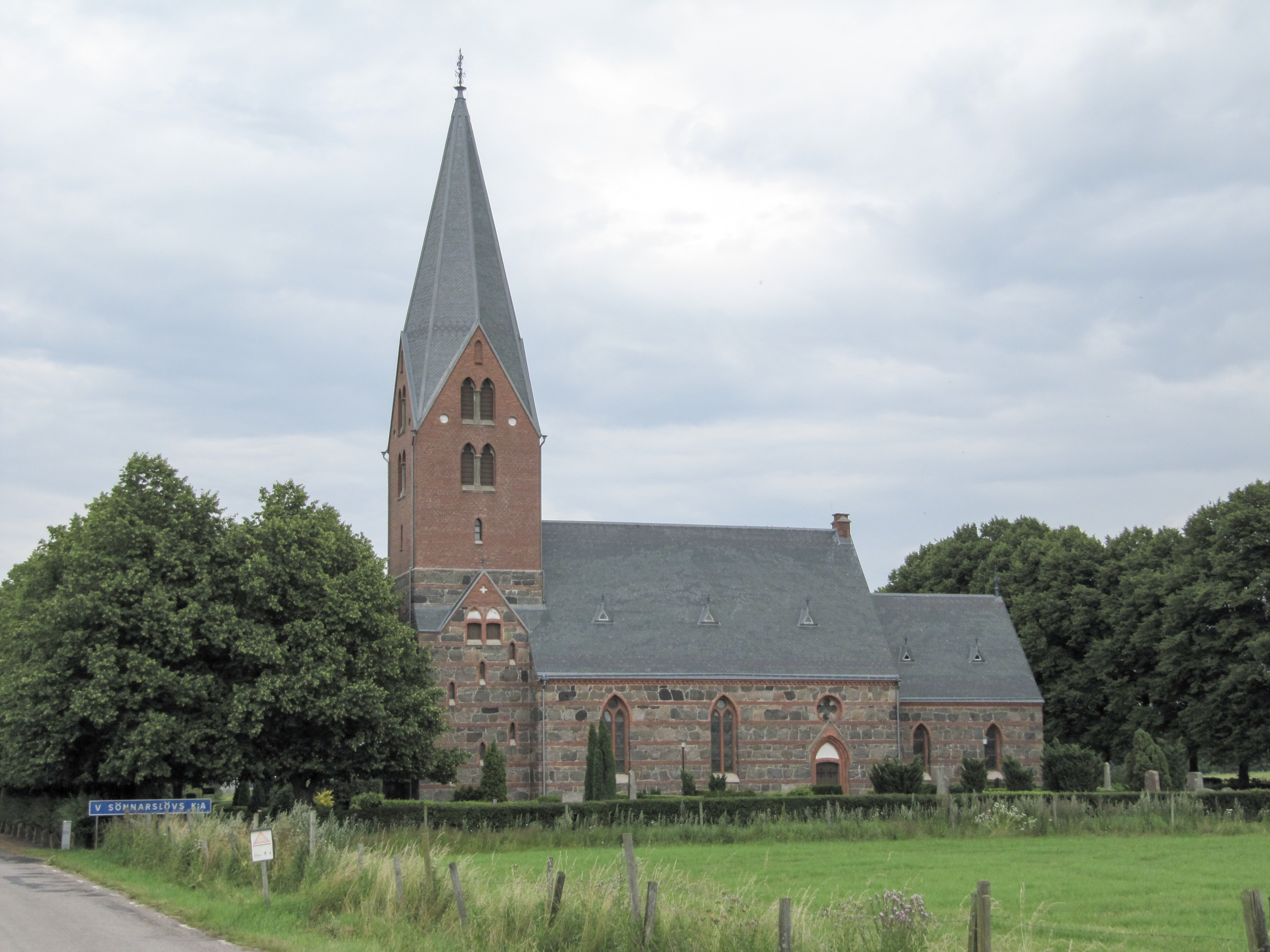 Västra Sönnarslövs kyrka